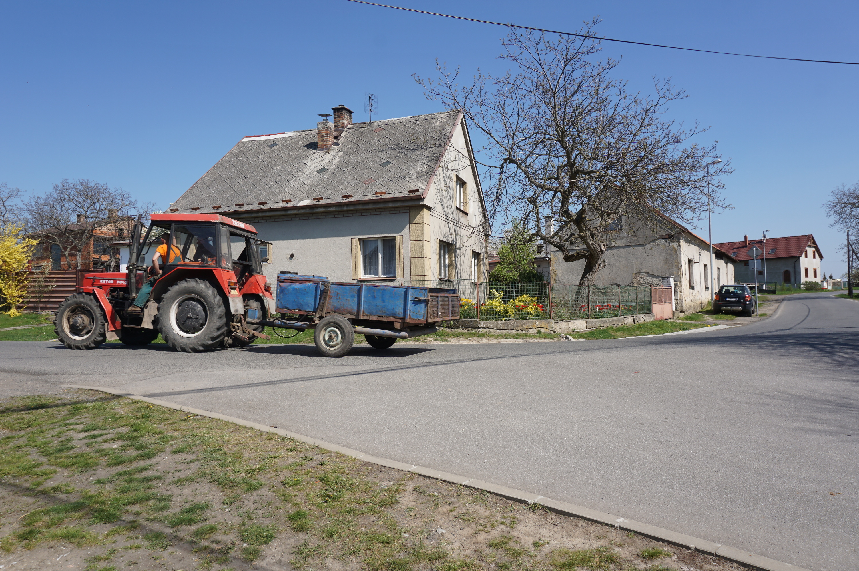 Chloumek (u Mladé Boleslavi) - čp. 1 a 22